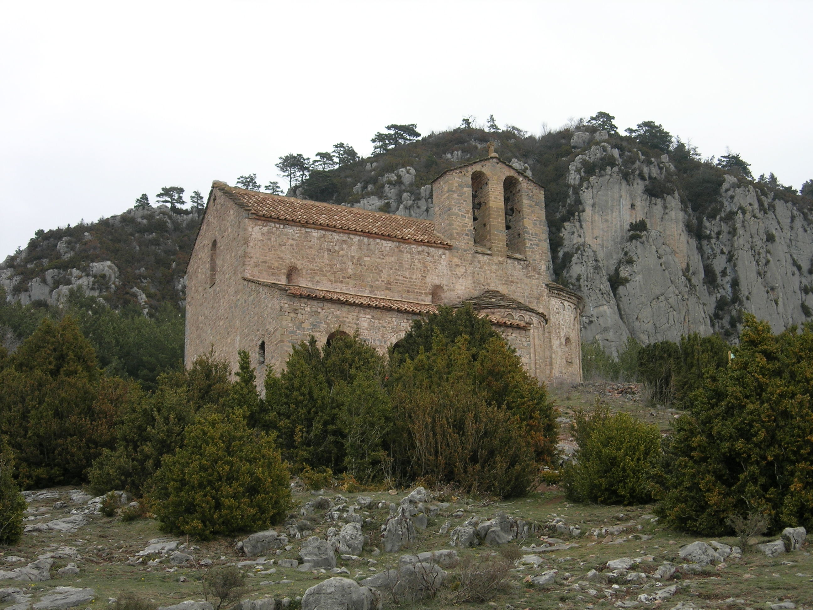 Sant Pere de Montgrony DSCN4502